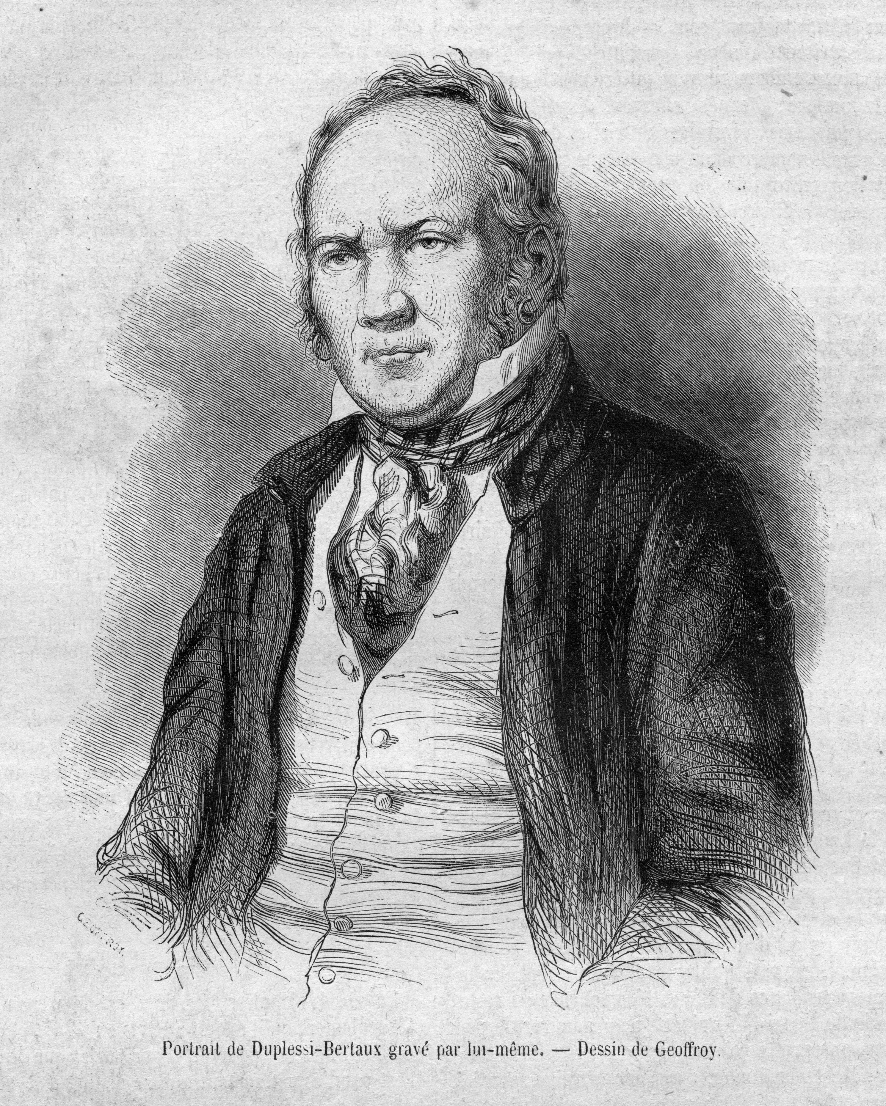 portrait gravé